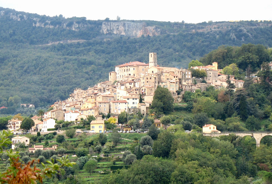 Bar-sur-Loup, Alpes-Maritimes, France